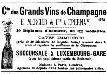 Annonce de la Compagnie des Grands Vins de Champagne E. Mercier & Cie, publiée au Luxemburger Wort du 6 aout 1889